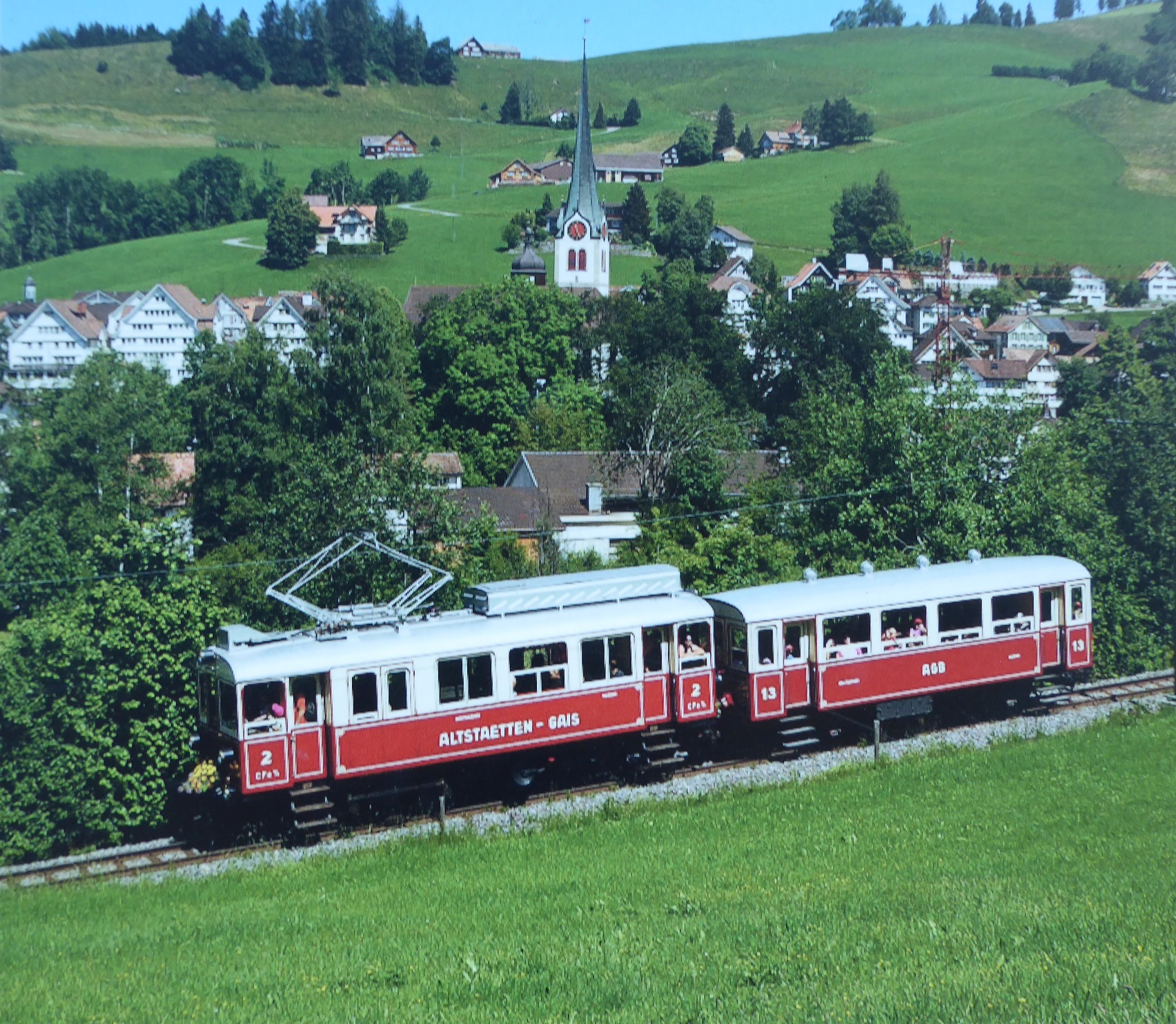 Triebwagen CFe 3/3 mit Personenwagen C13 der früheren Altstätten-Gais-Bahn bei Gais